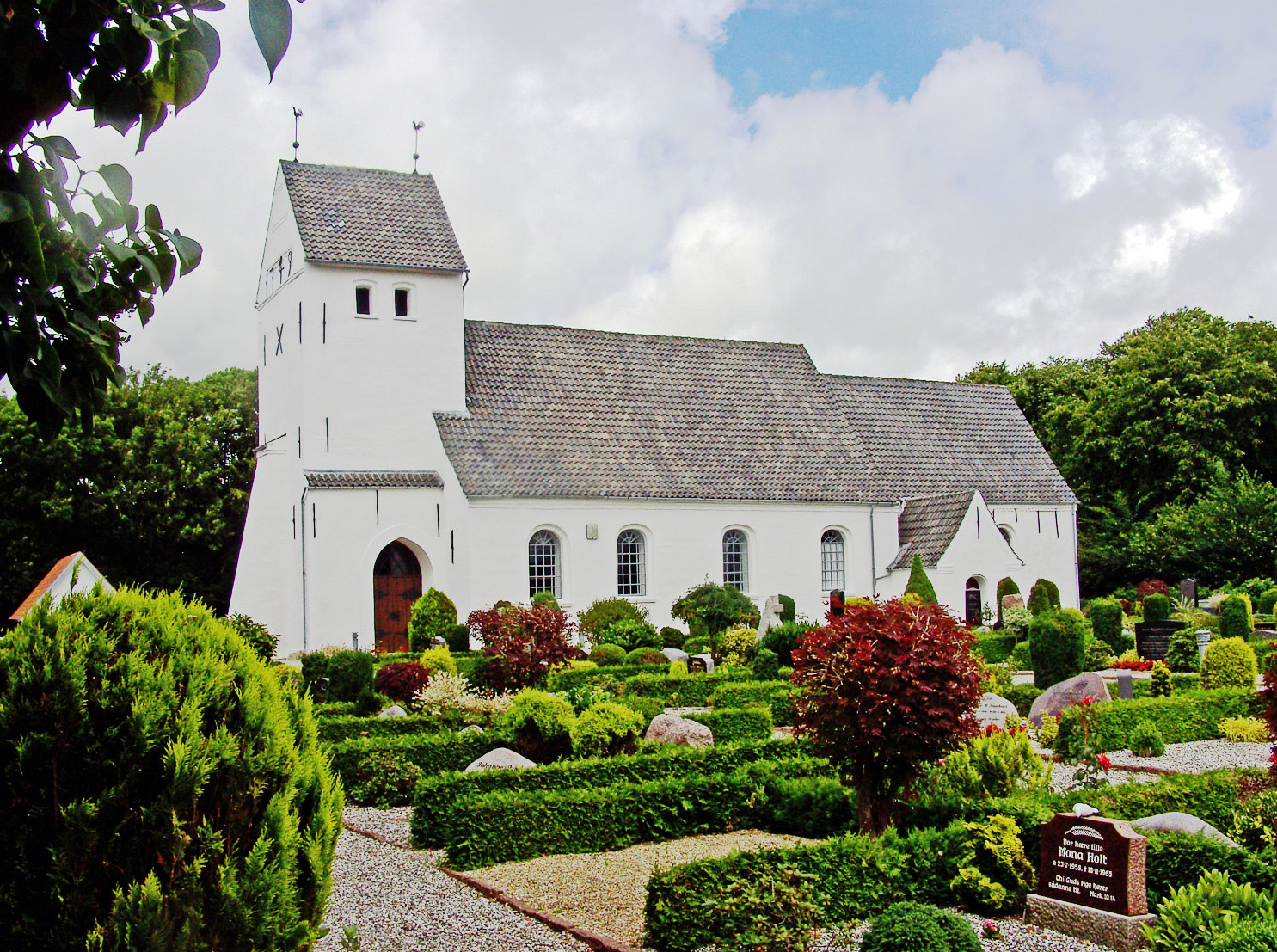 fra syd